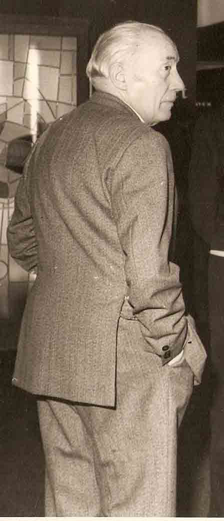 Josep Maria Bonet